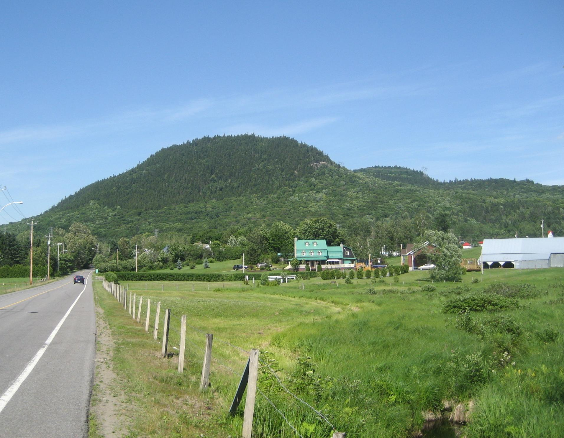 Mont Wright vu de la rue Crawford à Stoneham Québec Canada